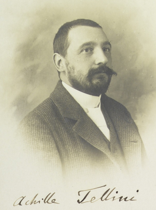 Immagine di Achille Tellini ritratto nel premiato studio fotografico di Arturo Pospisil a Padova nel 1905